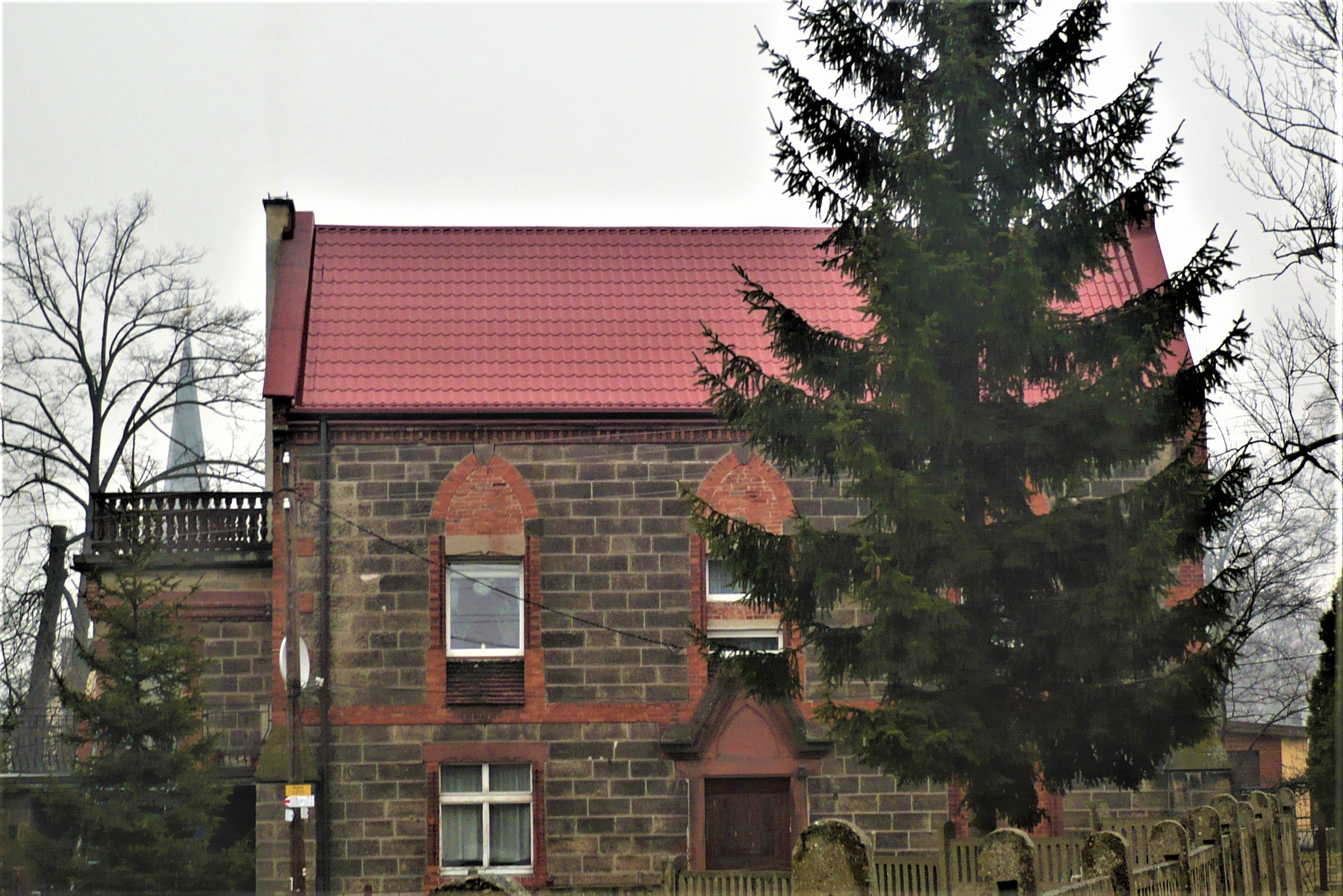 Kościół ewangelicki w Nowej Rudzie - Słupcu